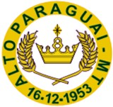 Brasão de Alto Paraguai